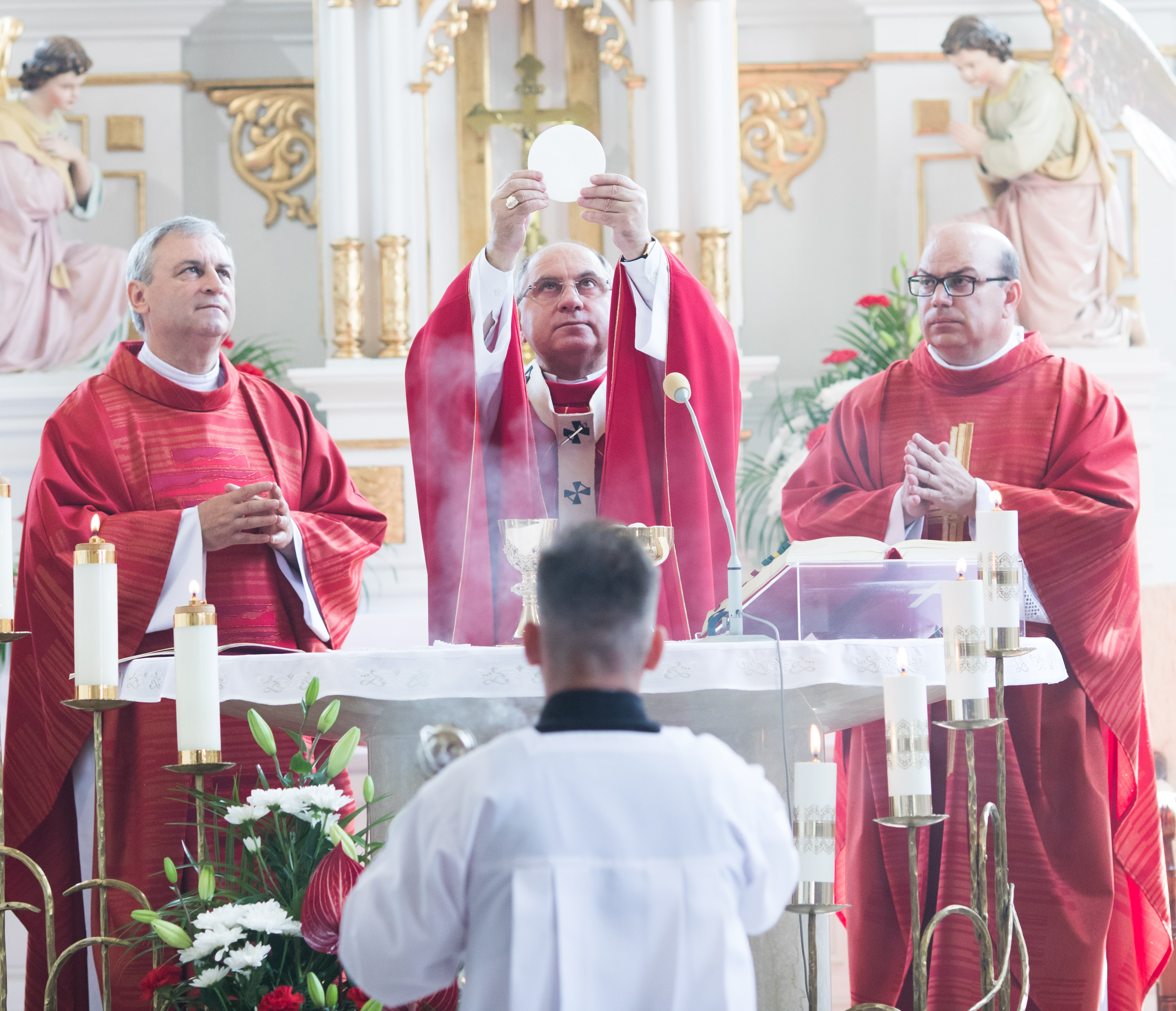 Sviatosť birmovania - Veľké Ozorovce, 2018